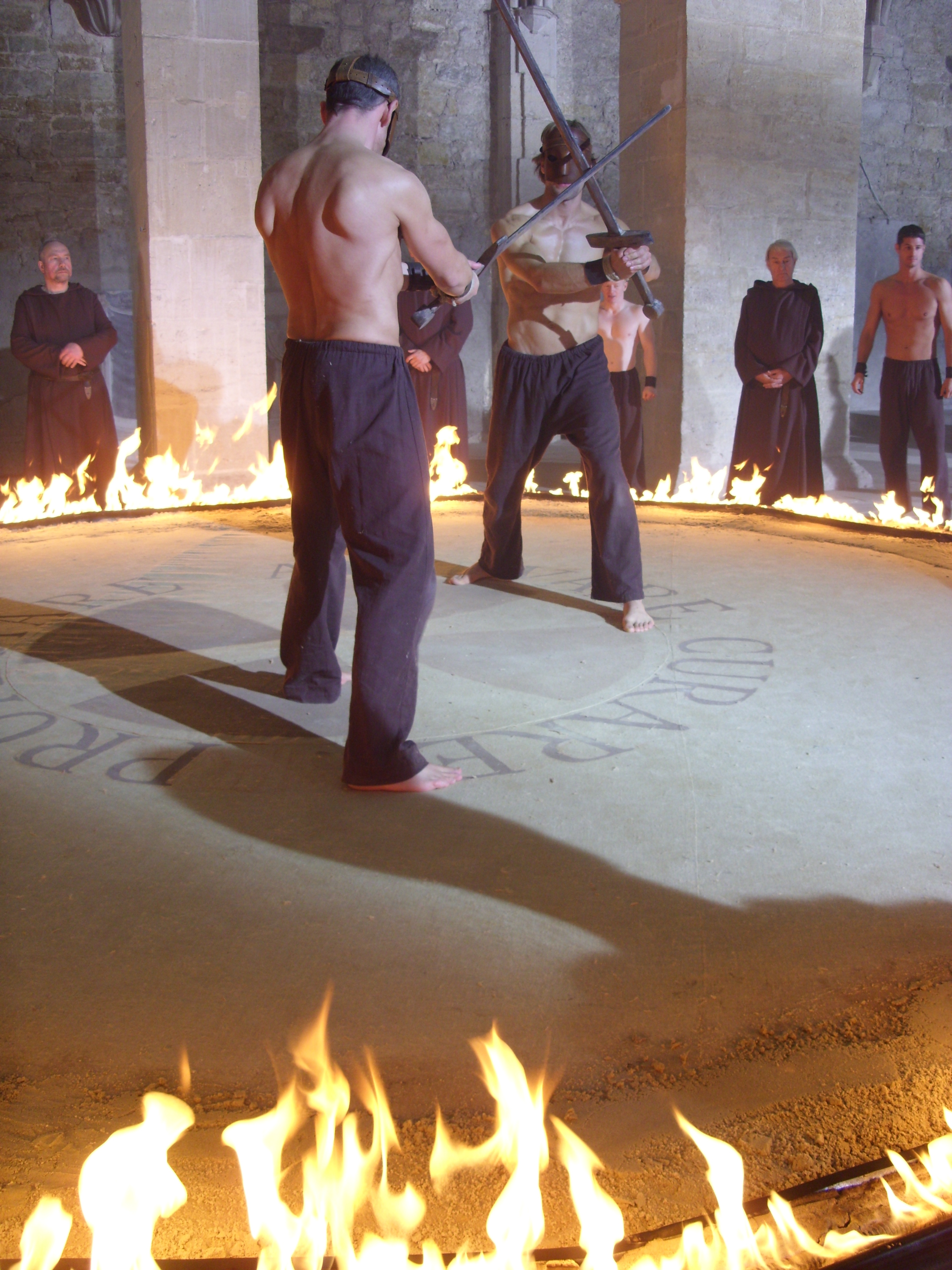 Lasko - Die Faust Gottes